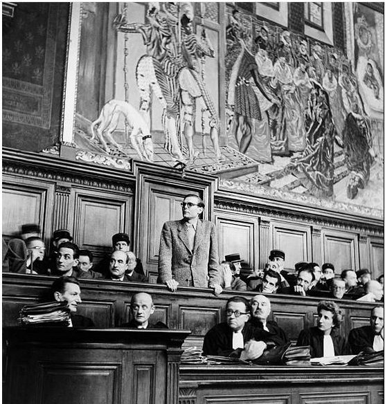 L'inculpé Gabriel Jeantet témoigne au procès de la Cagoule en 1948.